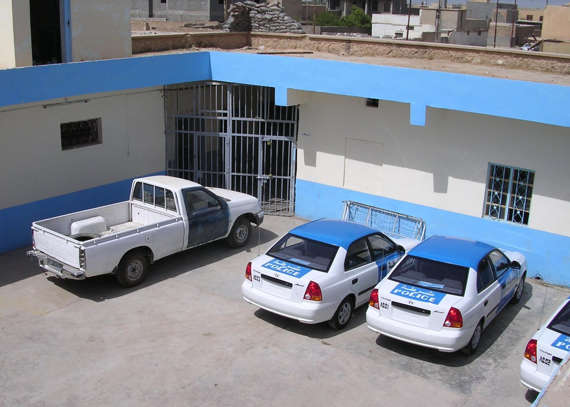 Hyundai Accent Iraqi police vehicles